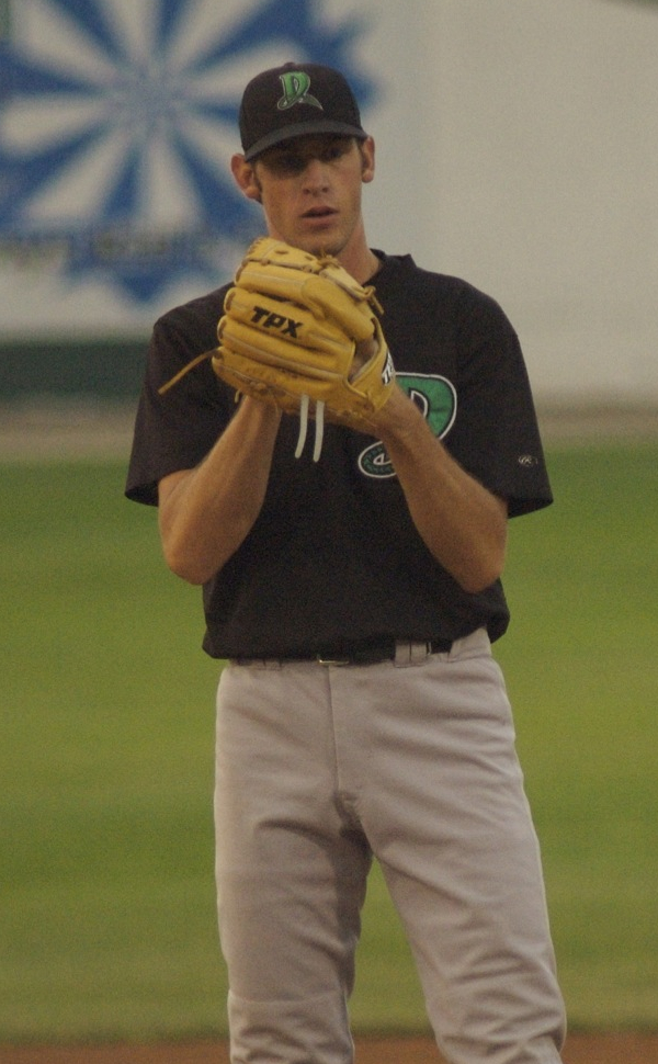 Logan Ondrusek